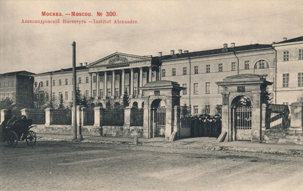 Москва. Александровский институт. Открытое письмо изд. Шерер, Набгольц и Ко, № 300, 1902 год